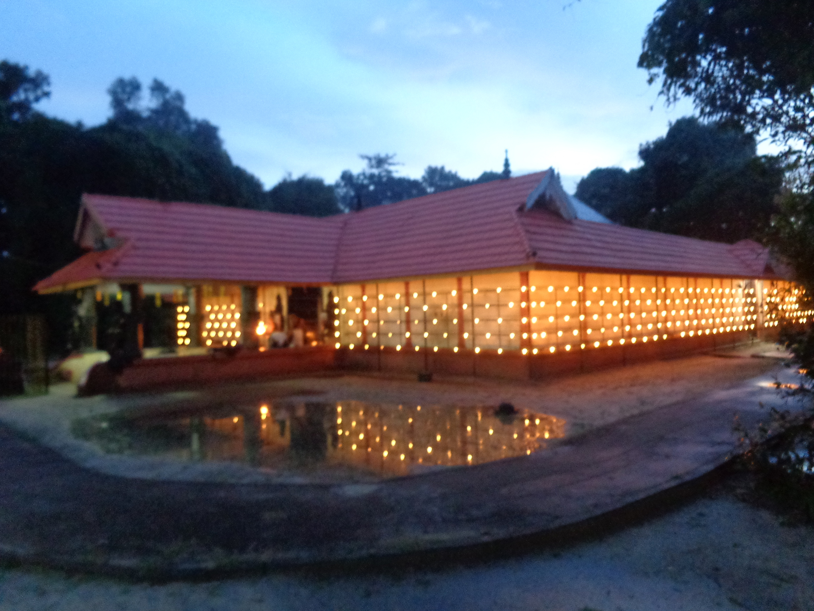 the chuttu vilakku in gurusi kaman temple